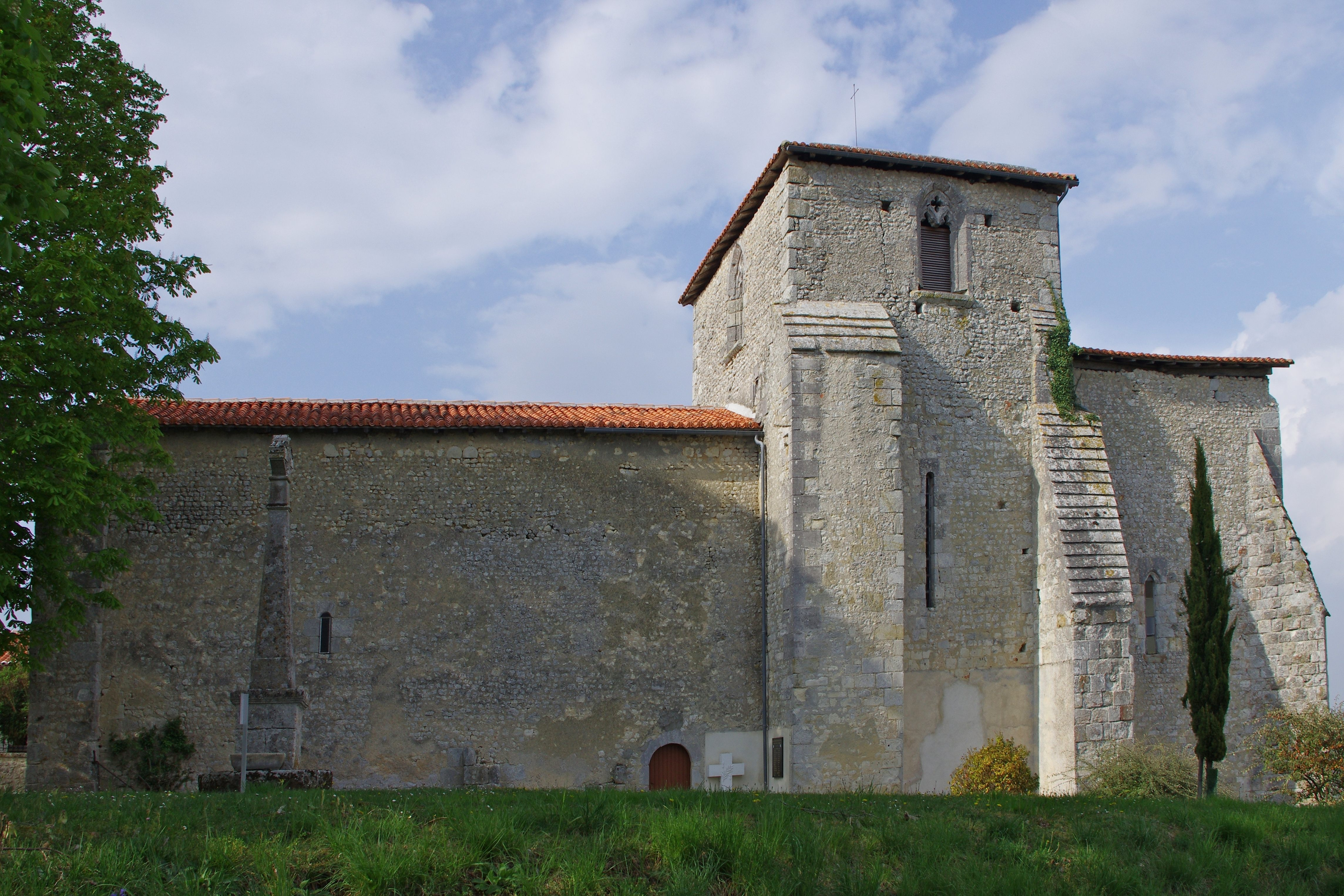 L'église Sainte-Souline de Sainte-Souline, Charente, France.